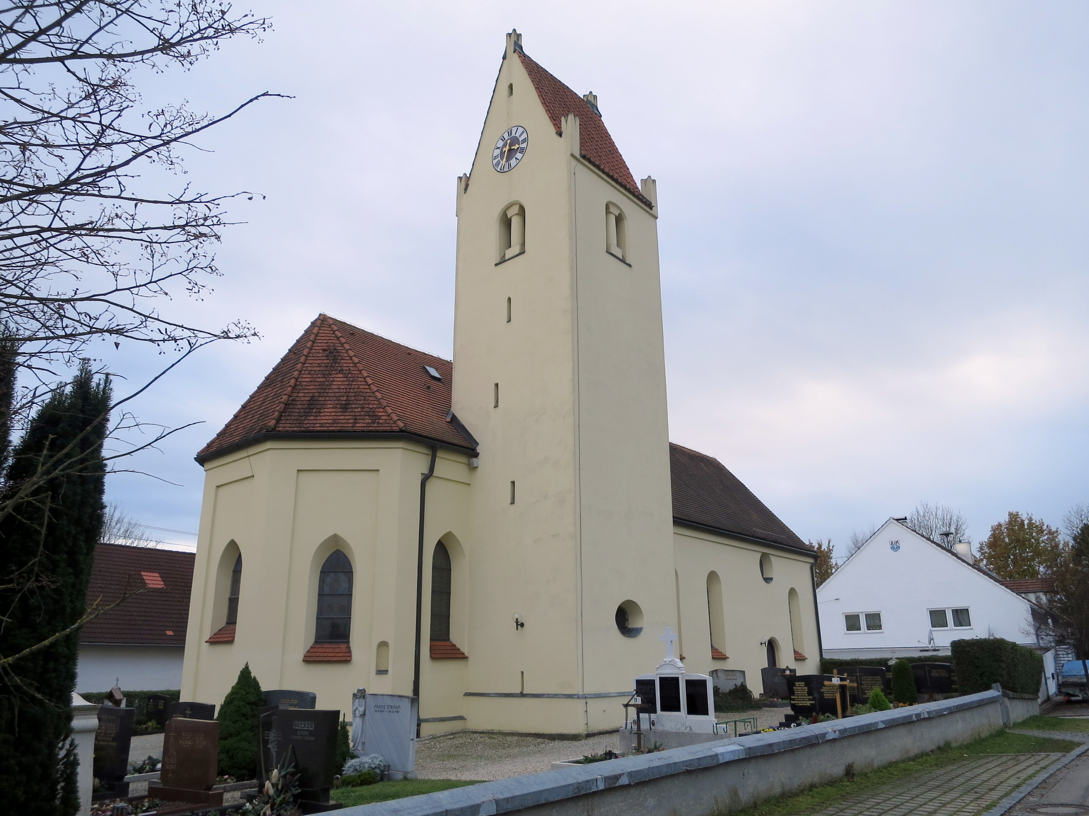 Kirche von der Chorseite aus